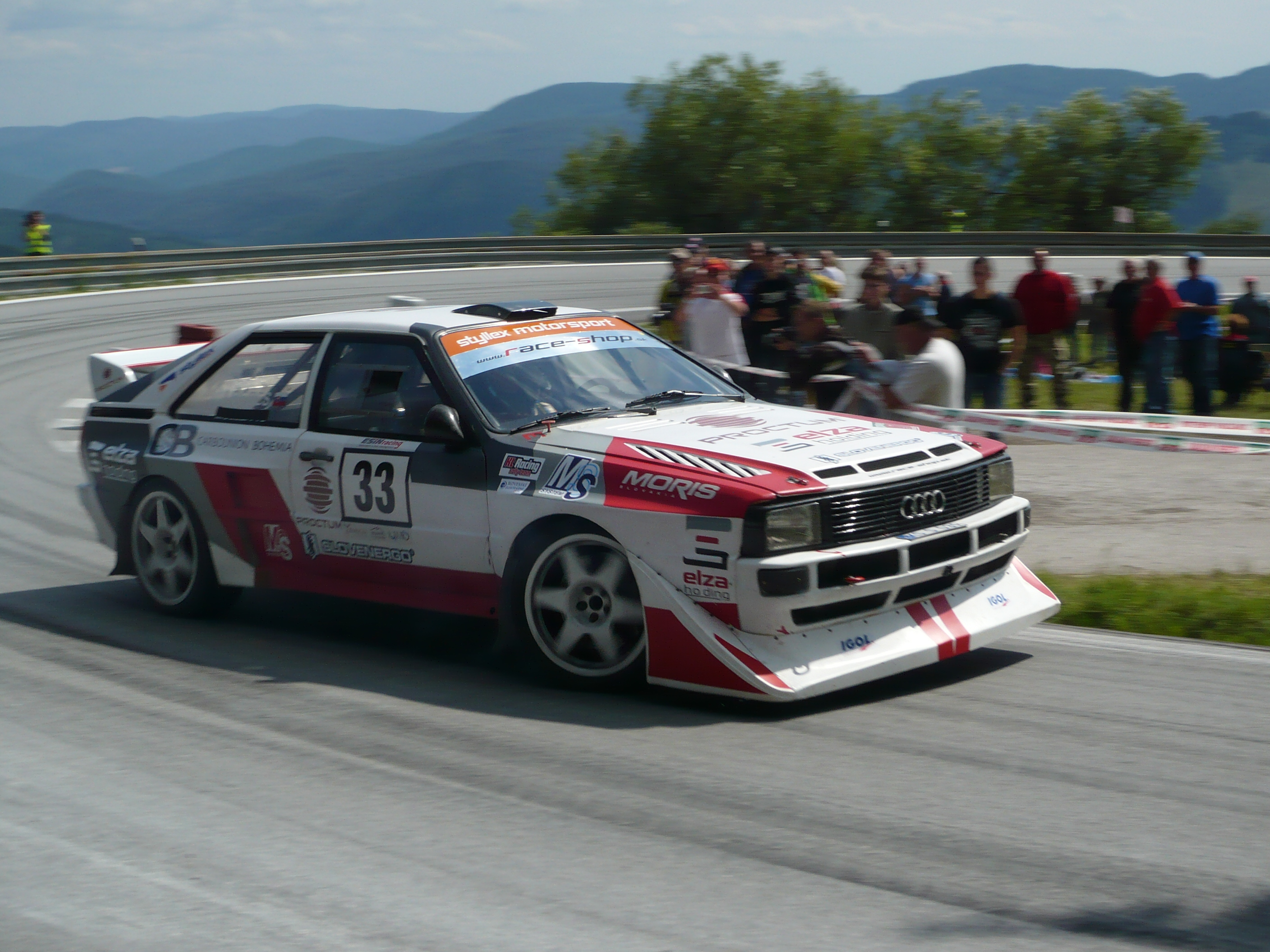 Audi Coupe Quattro Jozefa béreša ml. na ME PAV Dobšinský kopec 2012